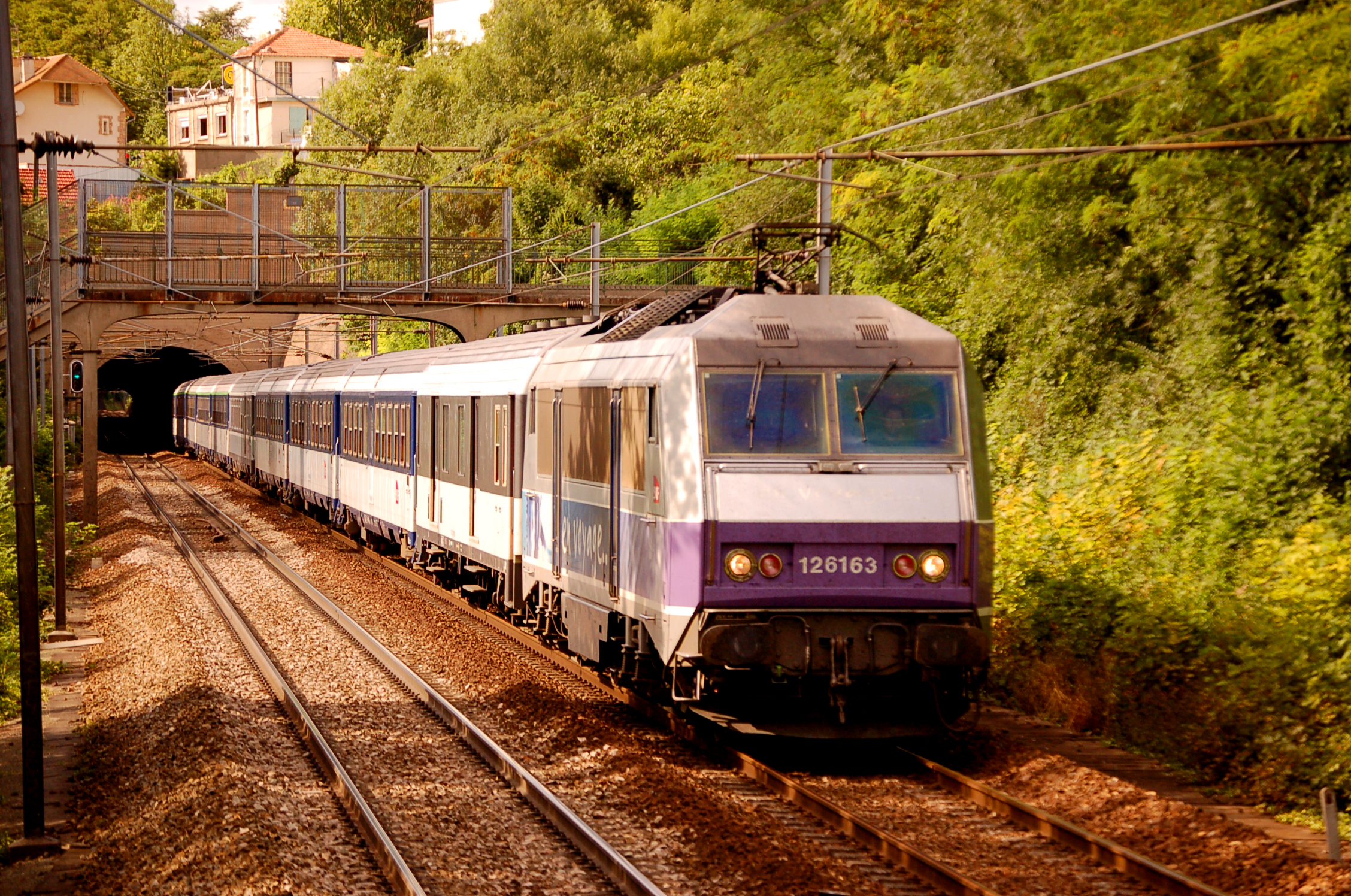 On trouve également des circulations voyageurs, comme ici ce train de pelerins de passage à Champigny, qui redescend sur Sucy.